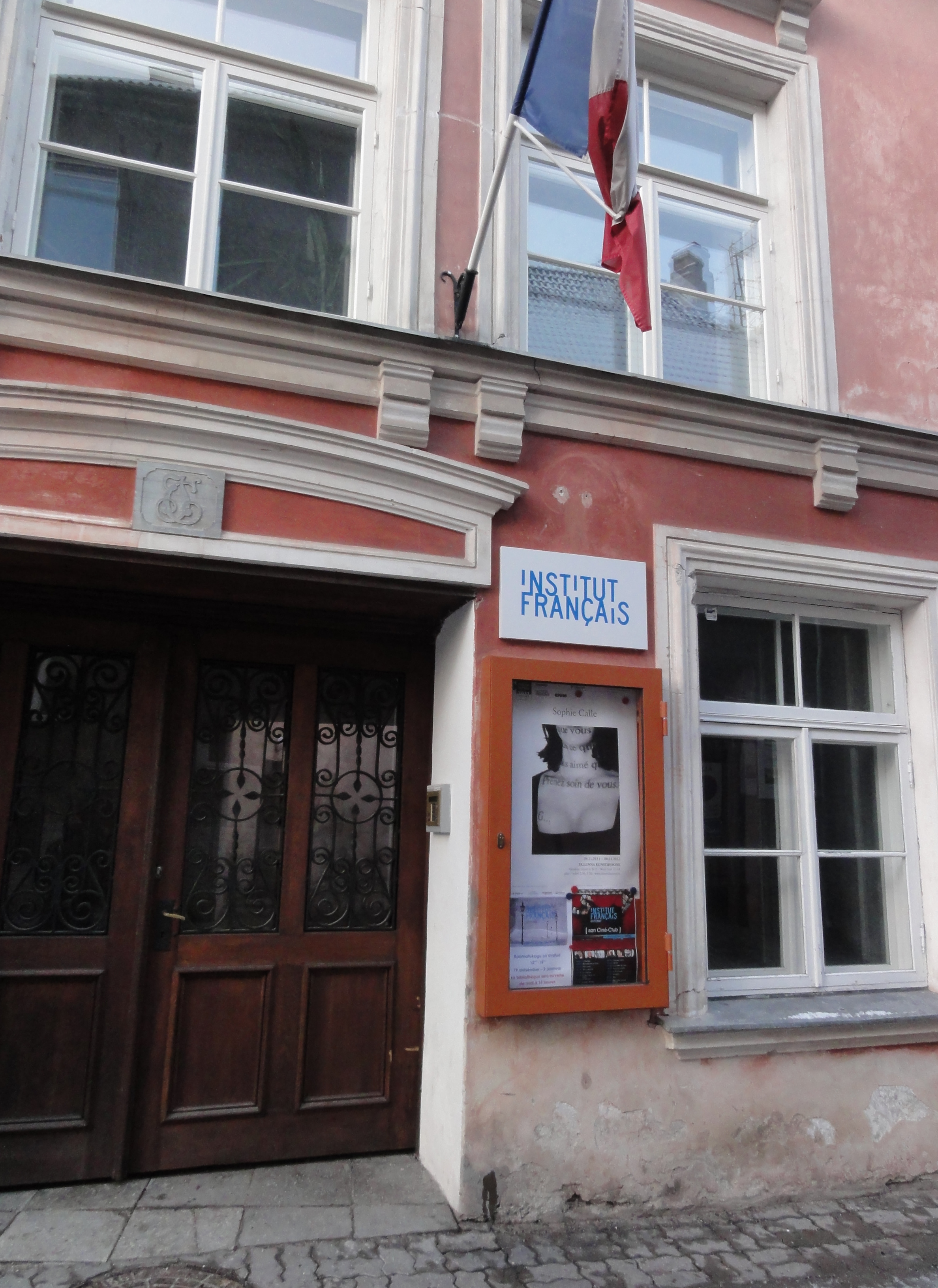 Prantsuse Instituut Eestis